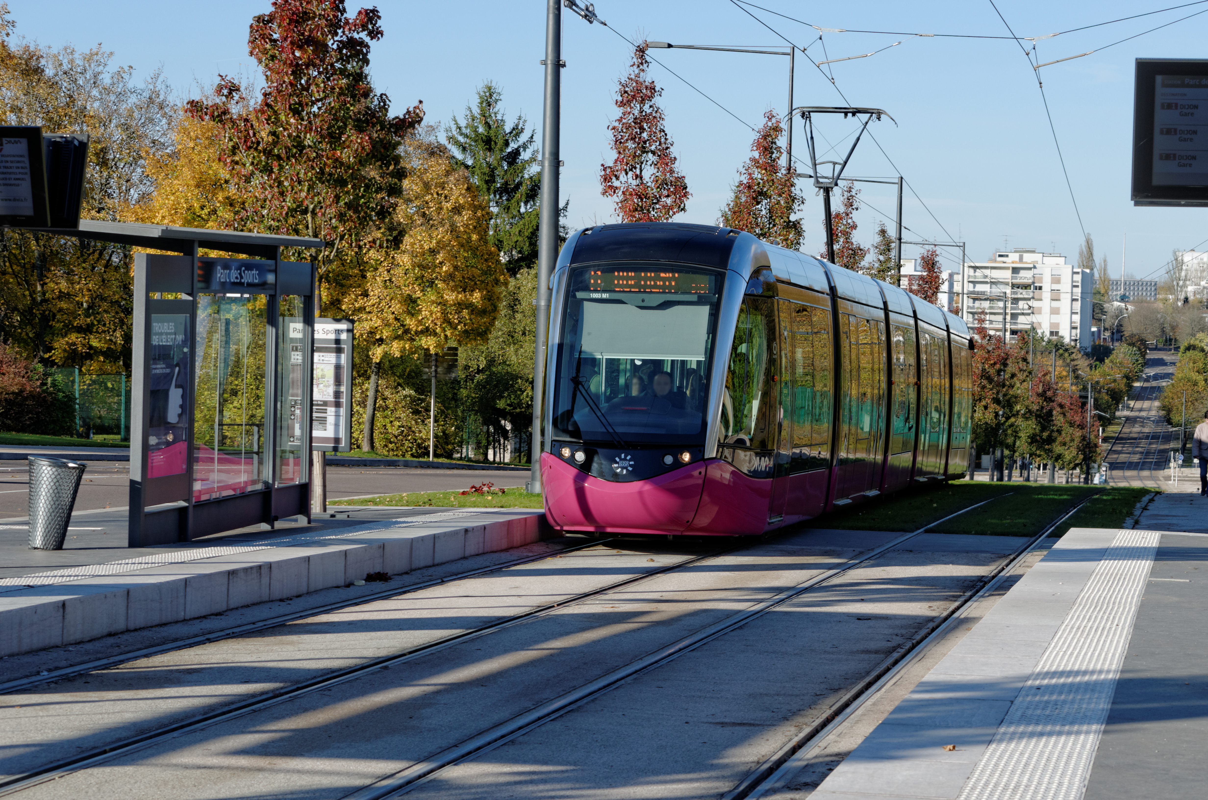 Arrivée du tramway à la station "Parc des sports", boulevard Louis Joseph Trimolet à Dijon